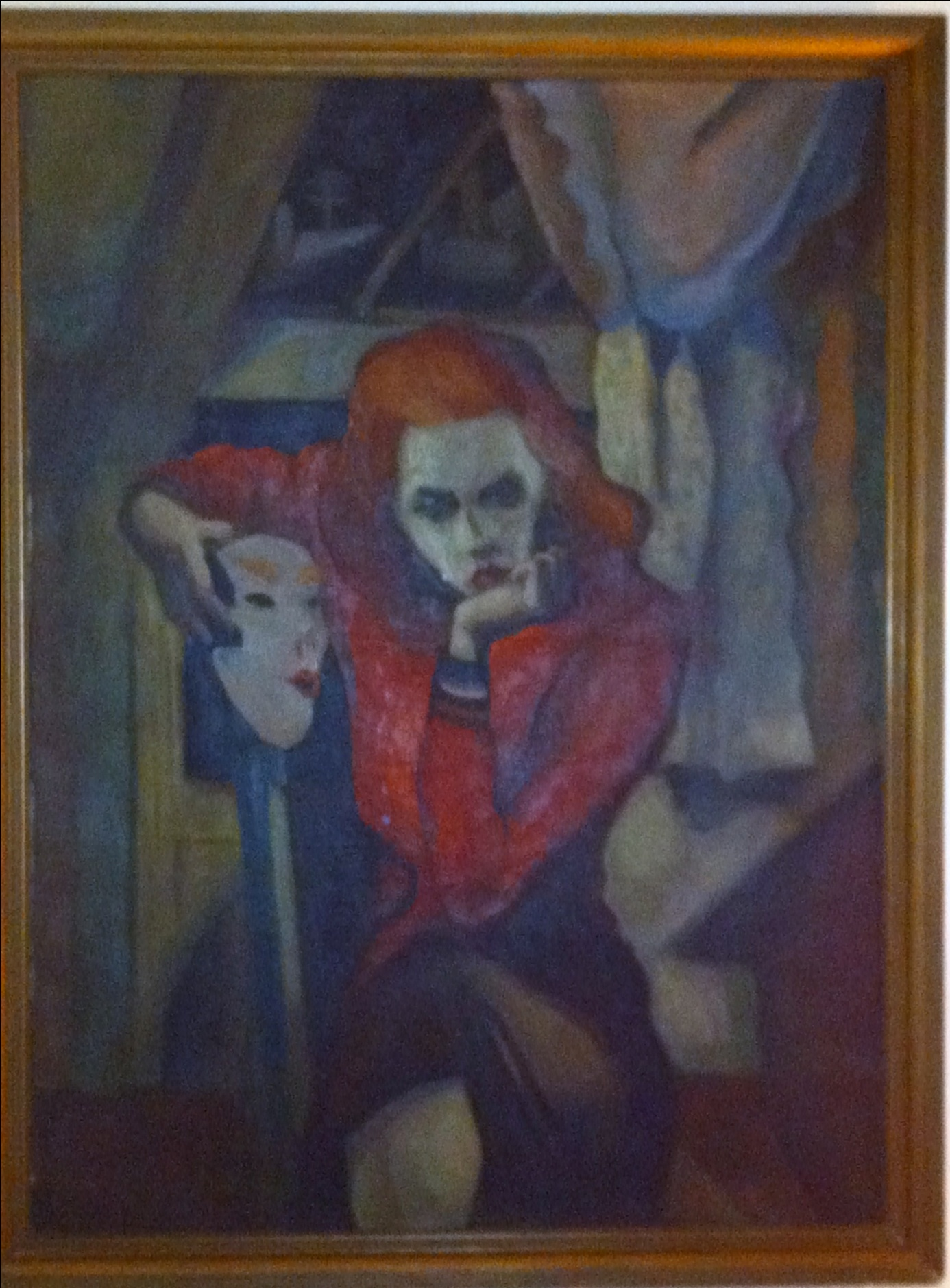 Gunvor Hall (1908 - 1961) Maleri olje på canvas. Privat eie Kirsten Smeland Luther / Ragnar Luther